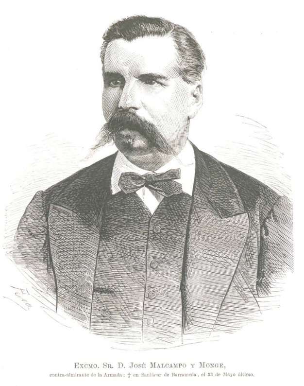 Excmo. Sr. D. José Malcampo y Monge, contra-almirante de la Armada, falleció en Sanlúcar de Barrameda, el 23 de Mayo último